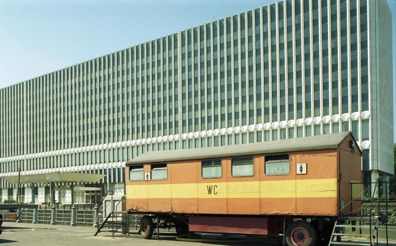 22.7.1991 Berlin-Mitte Kirmes Buden auf dem Marx-Engels-Platz, dahinter das ehemalige DDR-Außenmininsterium